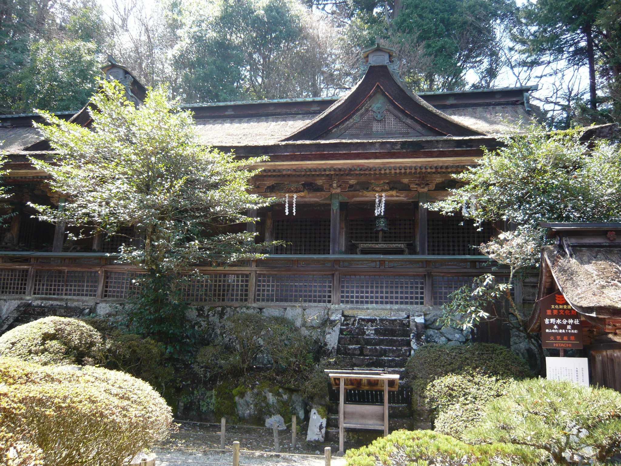 吉野町吉野山 吉野水分神社本殿 Yoshino-mikumari-jinja 2010.3.30